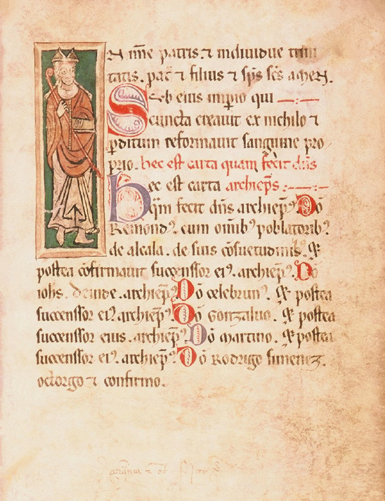 Primera página del Fuero Viejo extendido de Alcalá de Henares. Promulgado hacia 1235 por Rodrigo Jiménez de Rada. Sobre pergamino de 302 x 193 mm. Consta de 304 artículos, redactados en letra de tipo gótica libraria o textualis. El texto se inicia con la letra “I” (de In Nomine Patris…) habitada por un arzobispo mitrado, que sostiene un báculo en la mano derecha y un libro en la izquierda.[1][2]